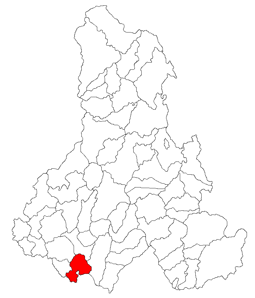 Categorie:Hărţi ale judeţului Harghita Contents 1 Licensing 2 Sursă 3 Licensing 4 Original upload log Licensing Sursă ro::Imagine:Harta_jud_Harghita.png